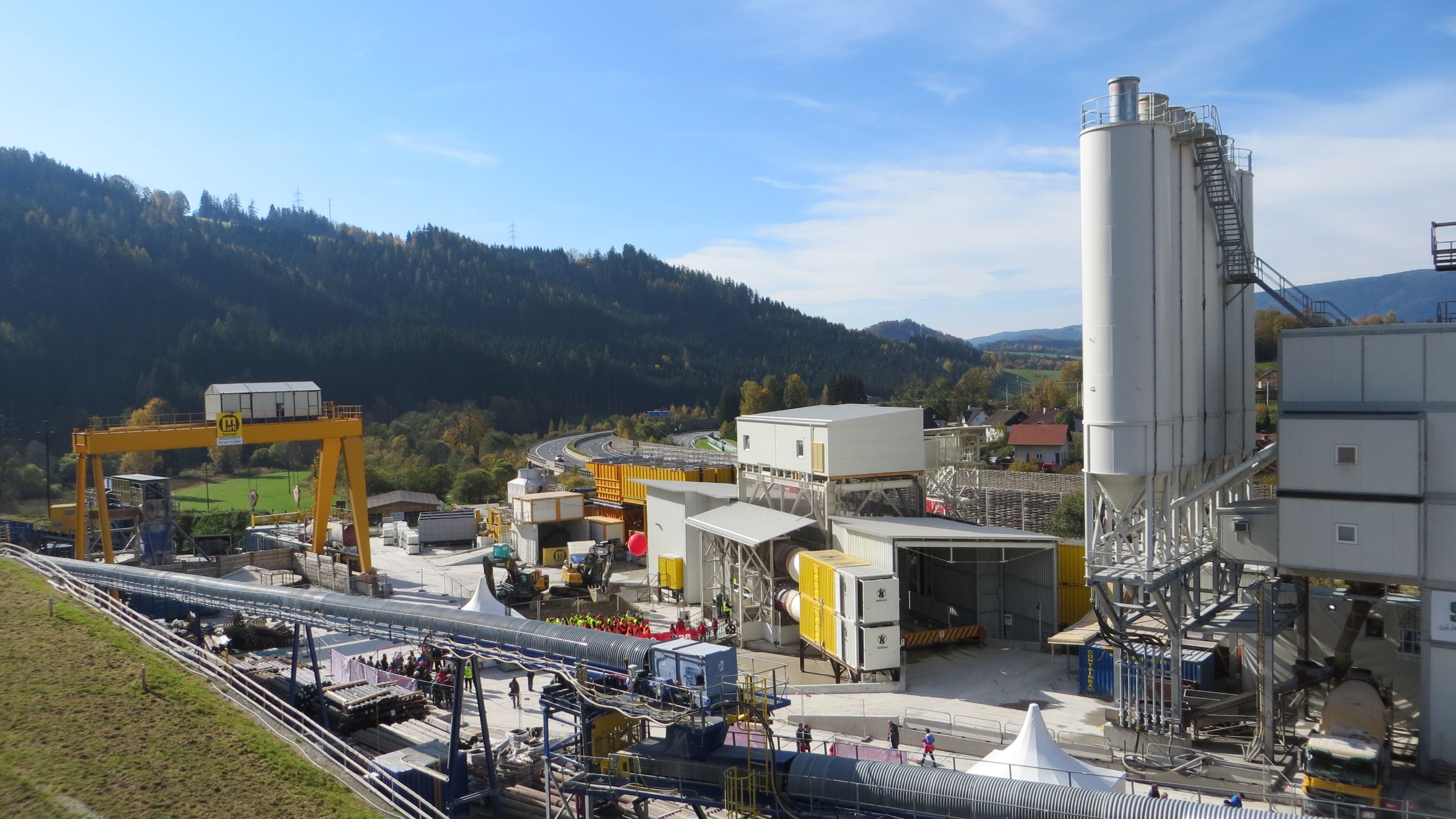 Semmering-Basistunnel, Übersicht über die Baustelle Grautschenhof